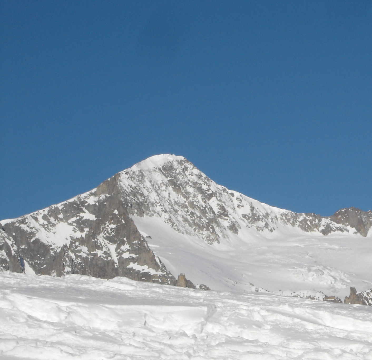 Galenstock (3586 m) von Südosten